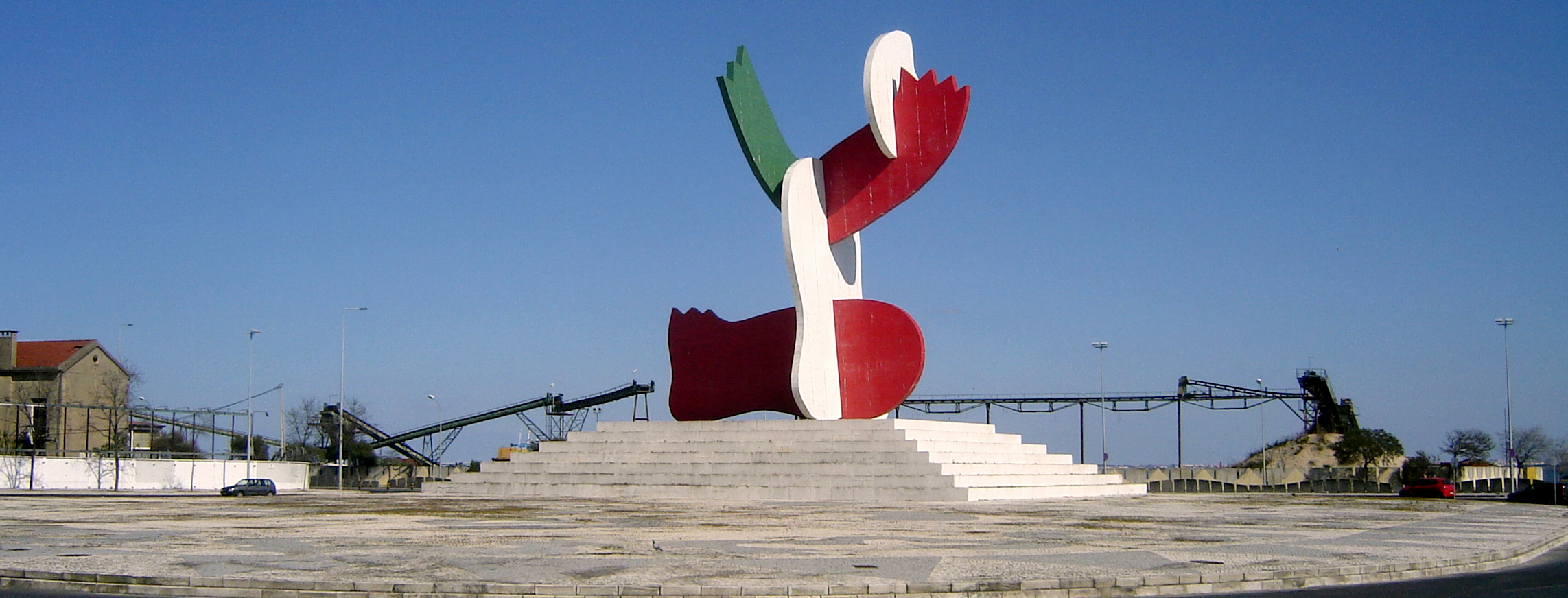 Vista para a Praça 25 de Abril em Lisboa, artista plástico português: José de Guimarães